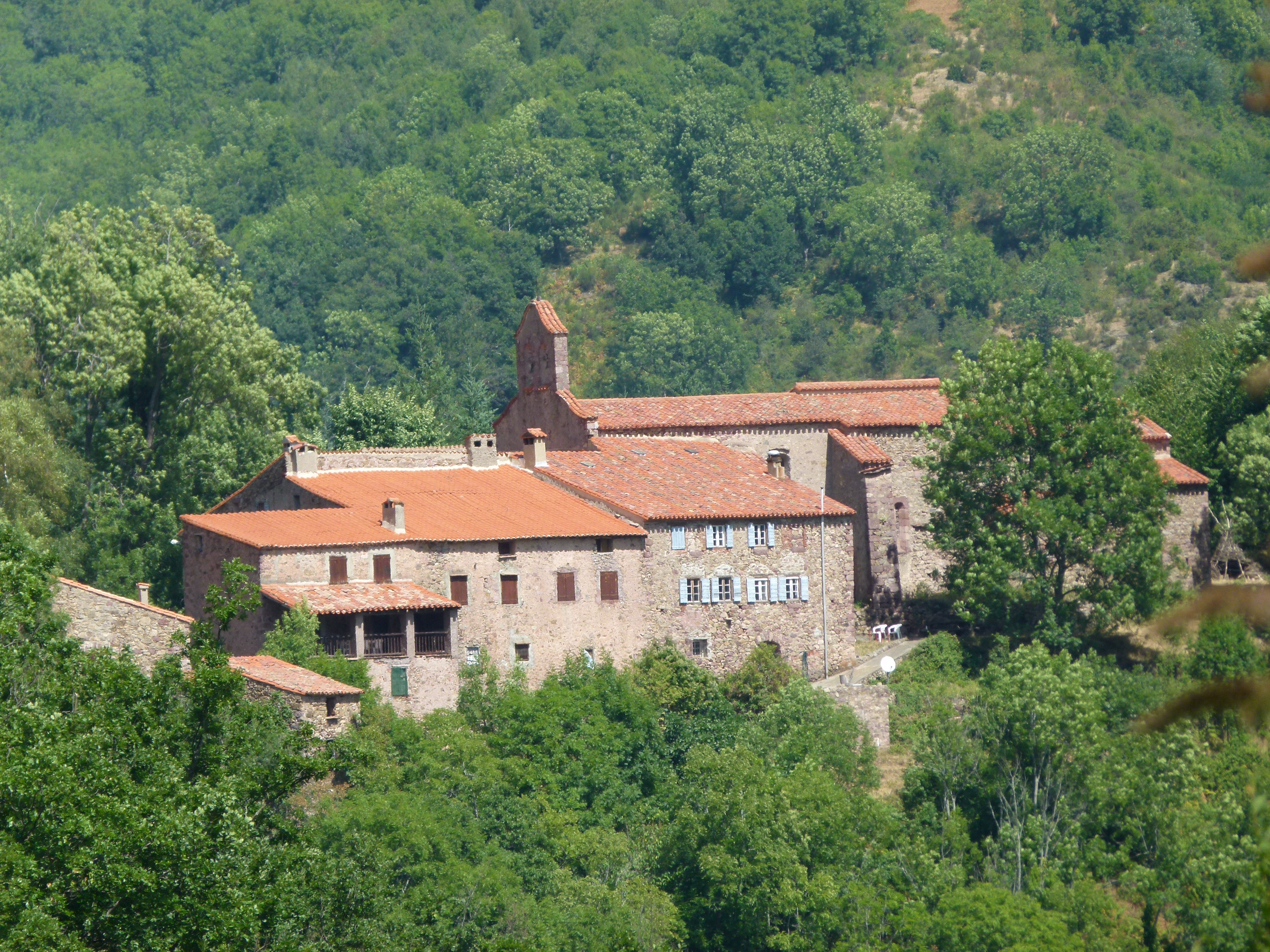 Ermita de Nostra Senyora del Coral (Prats de Molló i la Presta) .